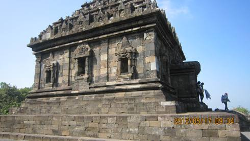 Basa Jawa: Candi Ijo ingkang wonten ing sakidulipun Candi Prambanan lan Candi Boko